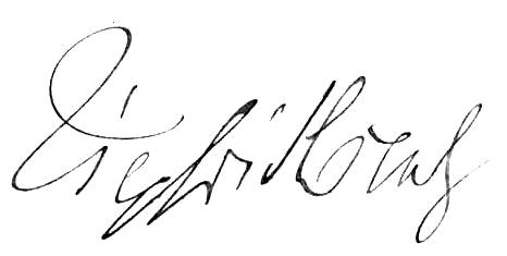 Siegfried Loewy (1857–1931), Autogramm des Schriftstellers